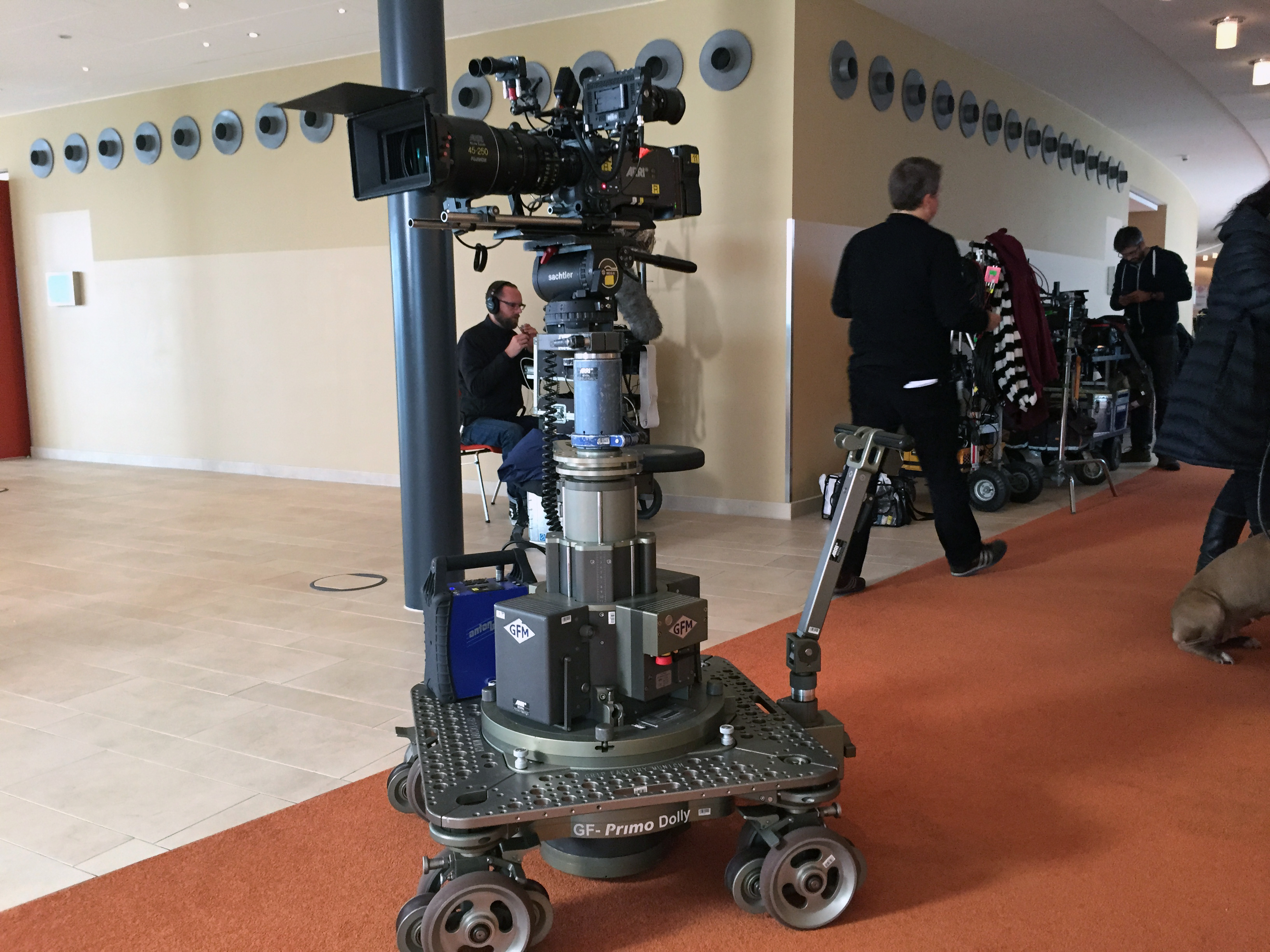 Bild vom Film dreh des "Tatort: Das Muli" für den RBB.